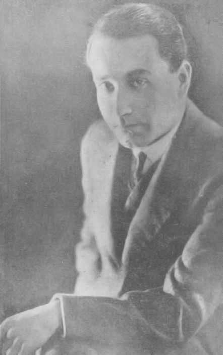 Juan Guzmán Cruchaga (n. Santiago; 27 de marzo de 1895 - f. Viña del Mar; 21 de julio de 1979) fue un poeta y diplomático chileno, Premio Nacional de Literatura en 1962.